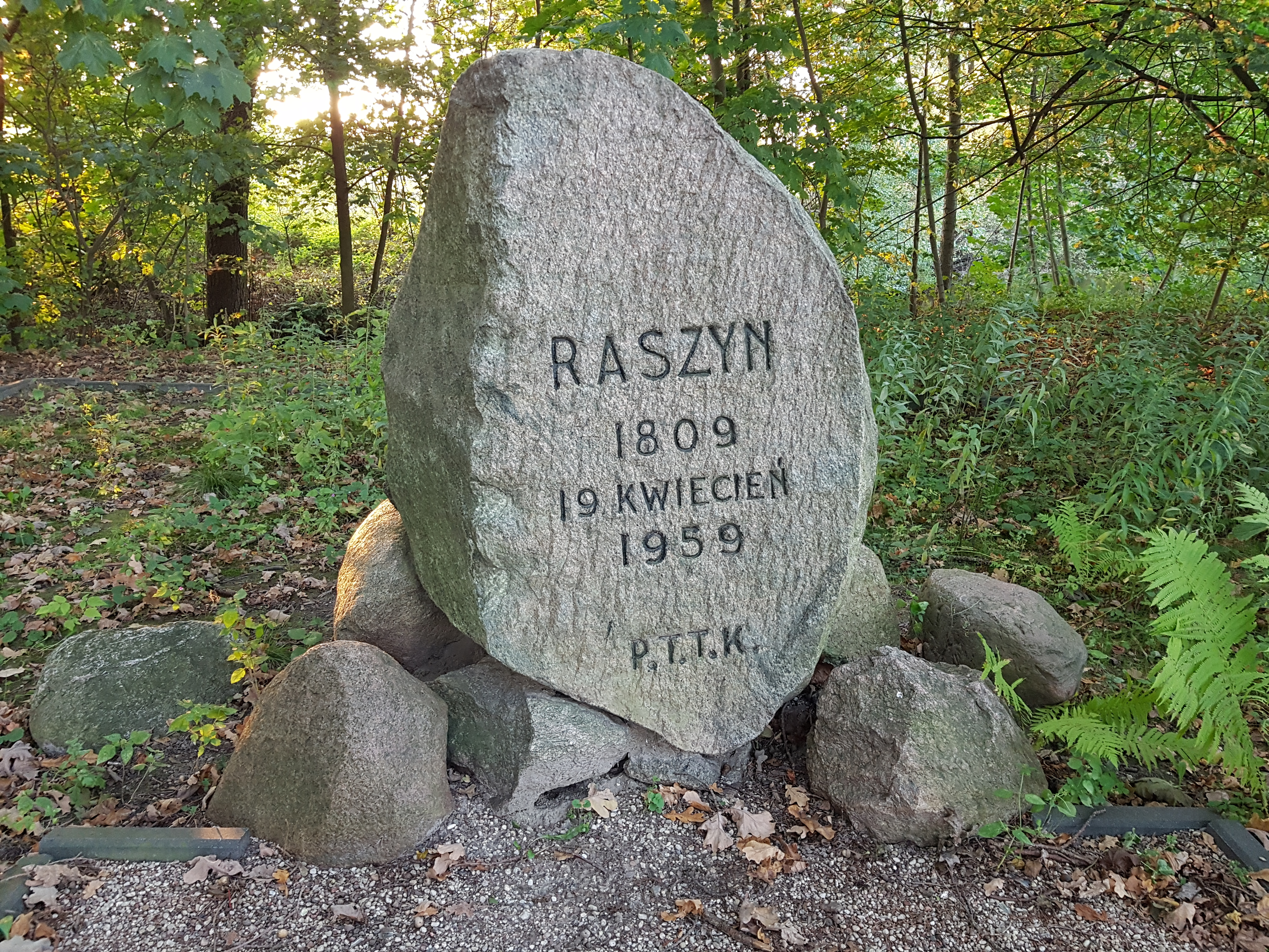 Kamienny pomnik upamiętniający bitwę pod Raszynem stoczoną w 1809 roku pomiędzy wojskami polskimi i saskimi